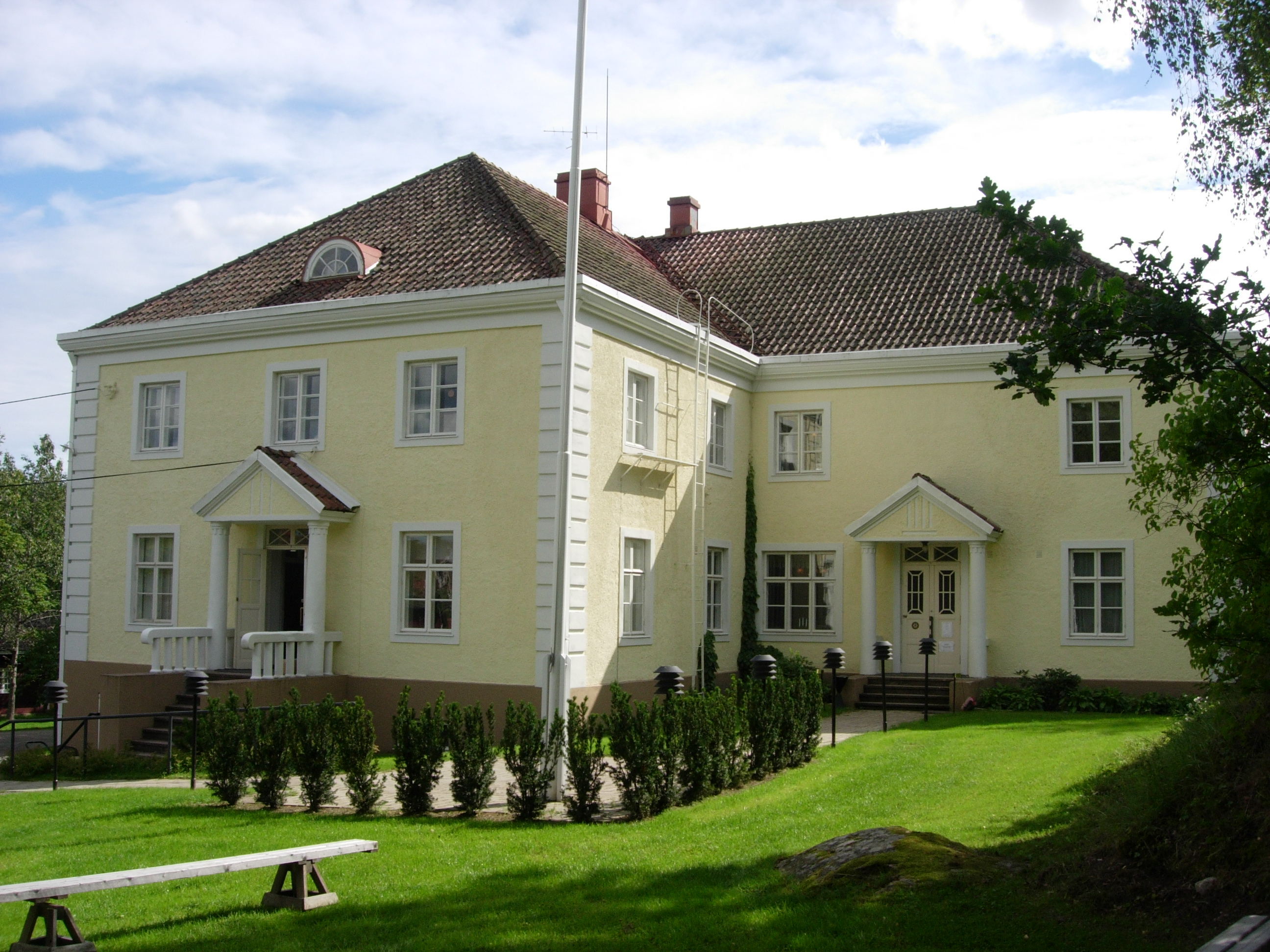 Liedon Vanhalinnan päärakennus luoteesta.